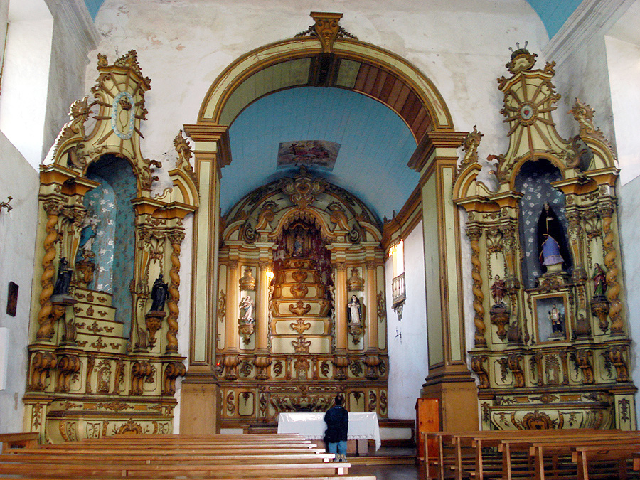 Interior da Igreja Matriz de Nossa Senhora da Conceição, Viamão, Brasil. Altar-mor e altares do cruzeiro